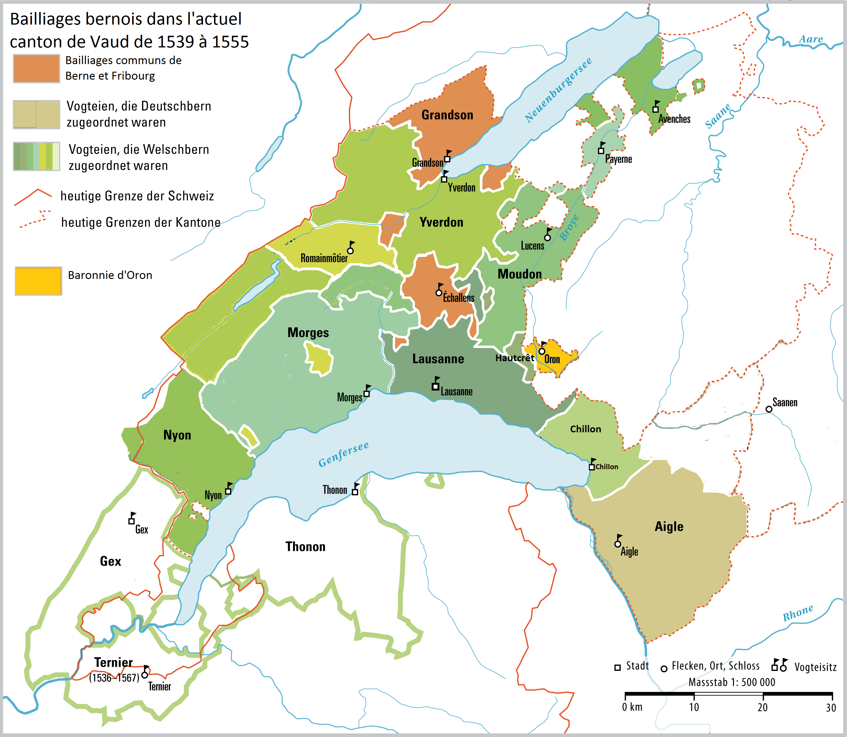 Carte des bailliages bernois dans l'actuel canton de Vaud de 1536 à 1555.